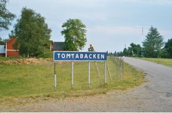 Tomtabacksskylten vid parkeringen